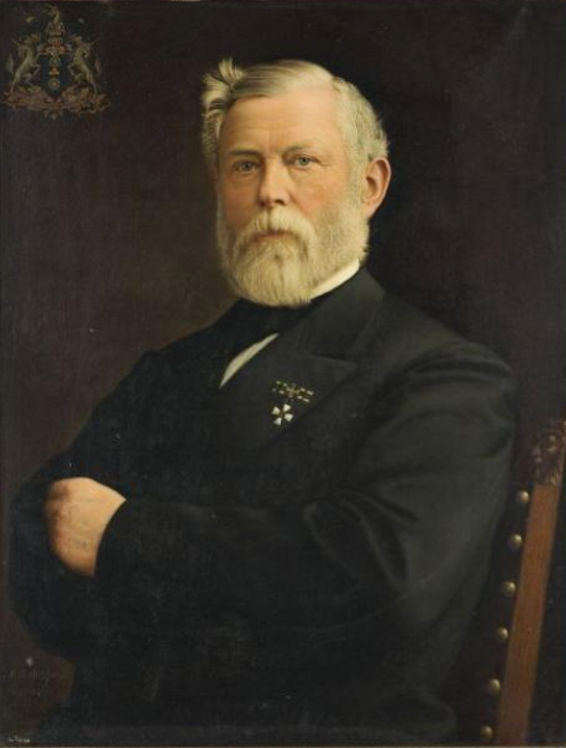 Portret van Douwe Jan Vincent van Sytzama (Leeuwarden 1816-1886 Driesum, op Rinsemastate). Wapen Van Sytzama linksboven (rechtsboven gezien vanuit het standpunt van de geportretteerde) Zoon van Johannes Galenus van Sytzama en Johanna Lewe tot Aduard. Hij huwt met Adriana Janke Albarda Sytzama in Ferwerd op 11 september 1843. Functies: Luitenant cavalerie; burgemeester Dantumadeel, lid Provinciale Staten van Friesland, kamerheer i.b.d.